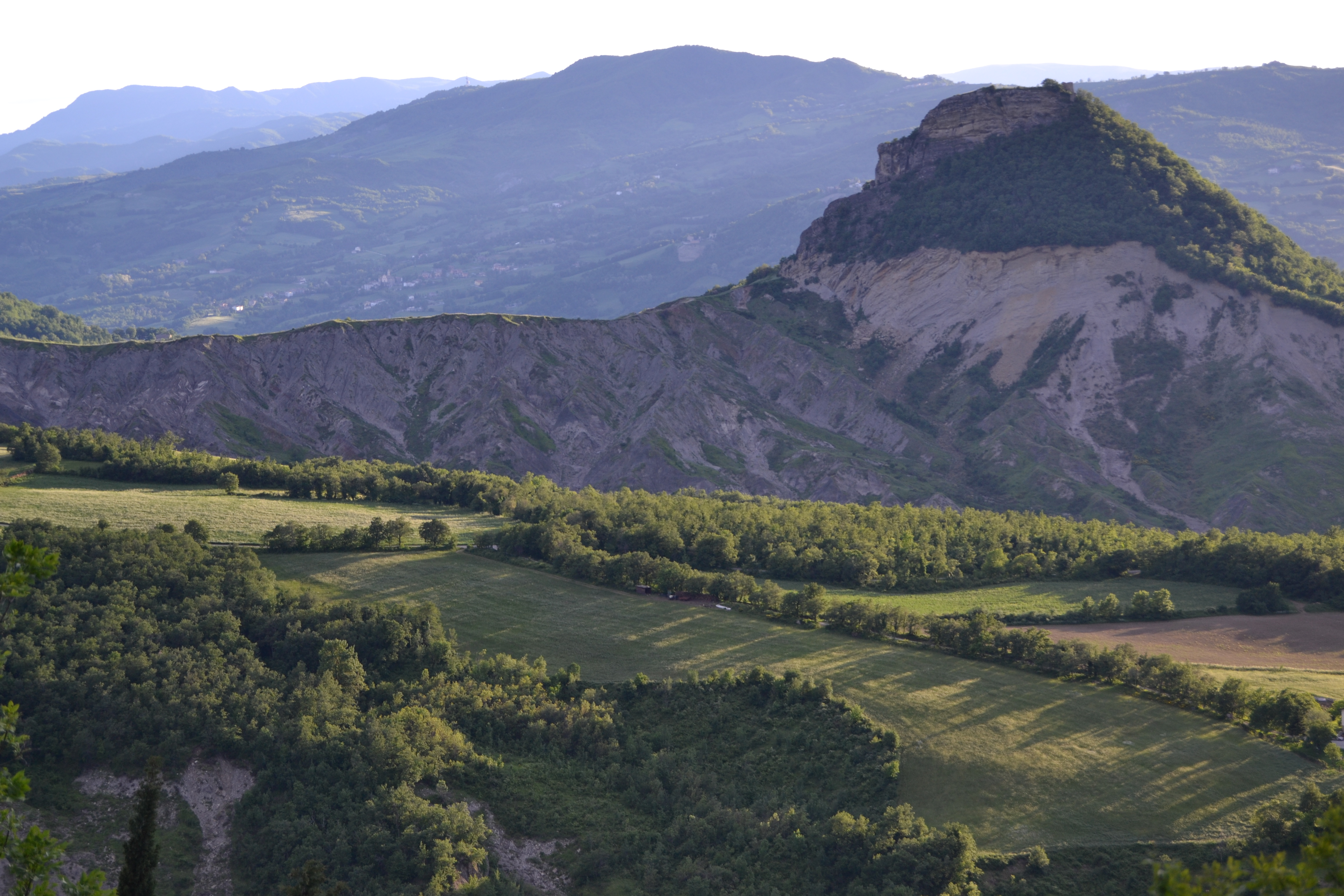 La piana di Boscara dove si sono accampati i tanti eserciti che nel corso dei secoli hanno cercato di conquistare il paese e la fortezza. L'unico lato debole dell'inespugnabile rupe di S.Leo.Sullo sfondo, in primo piano, Maioletto con i ruderi del castello